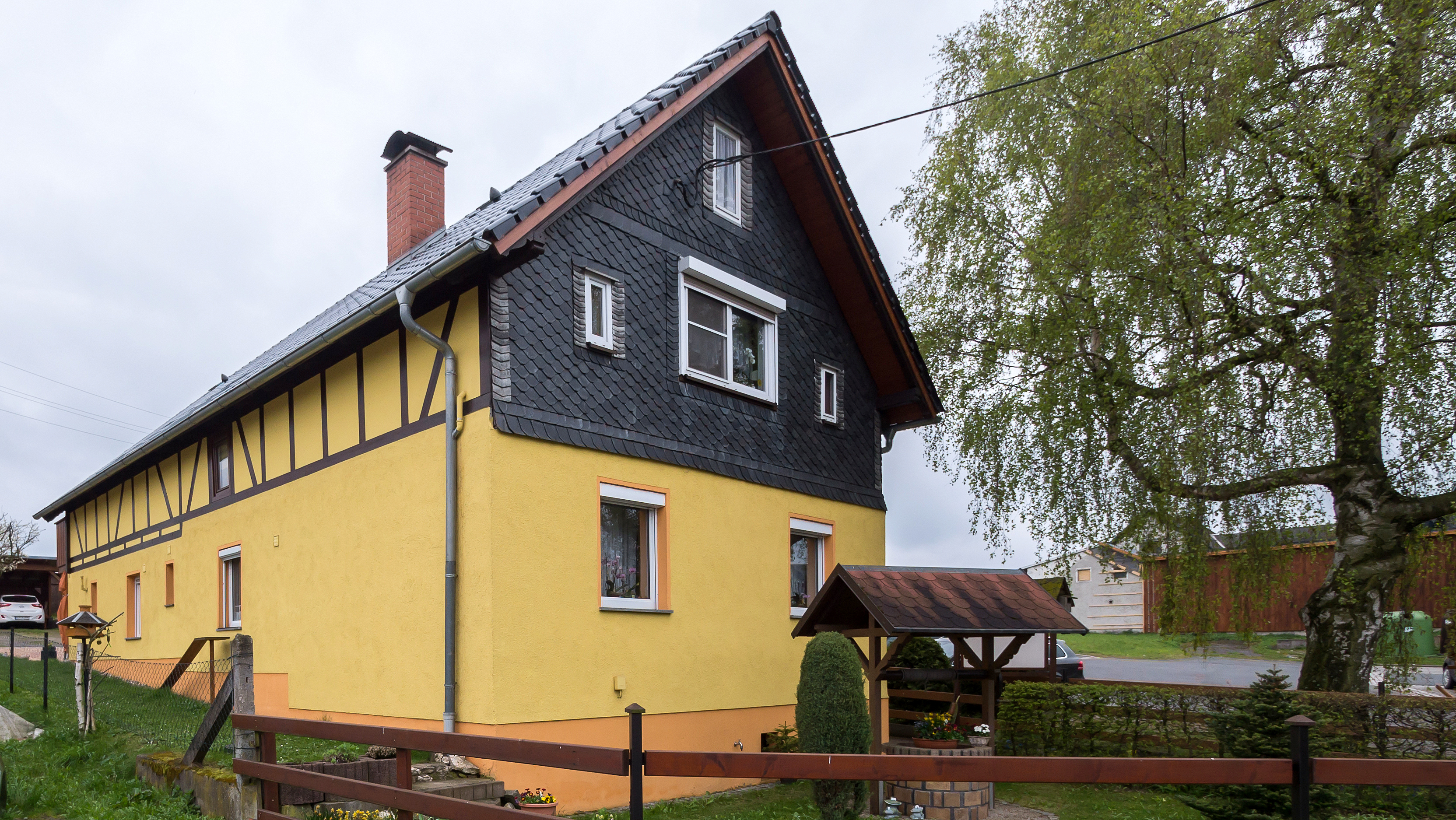 Arnsgereuth Ortsstraße 2 II